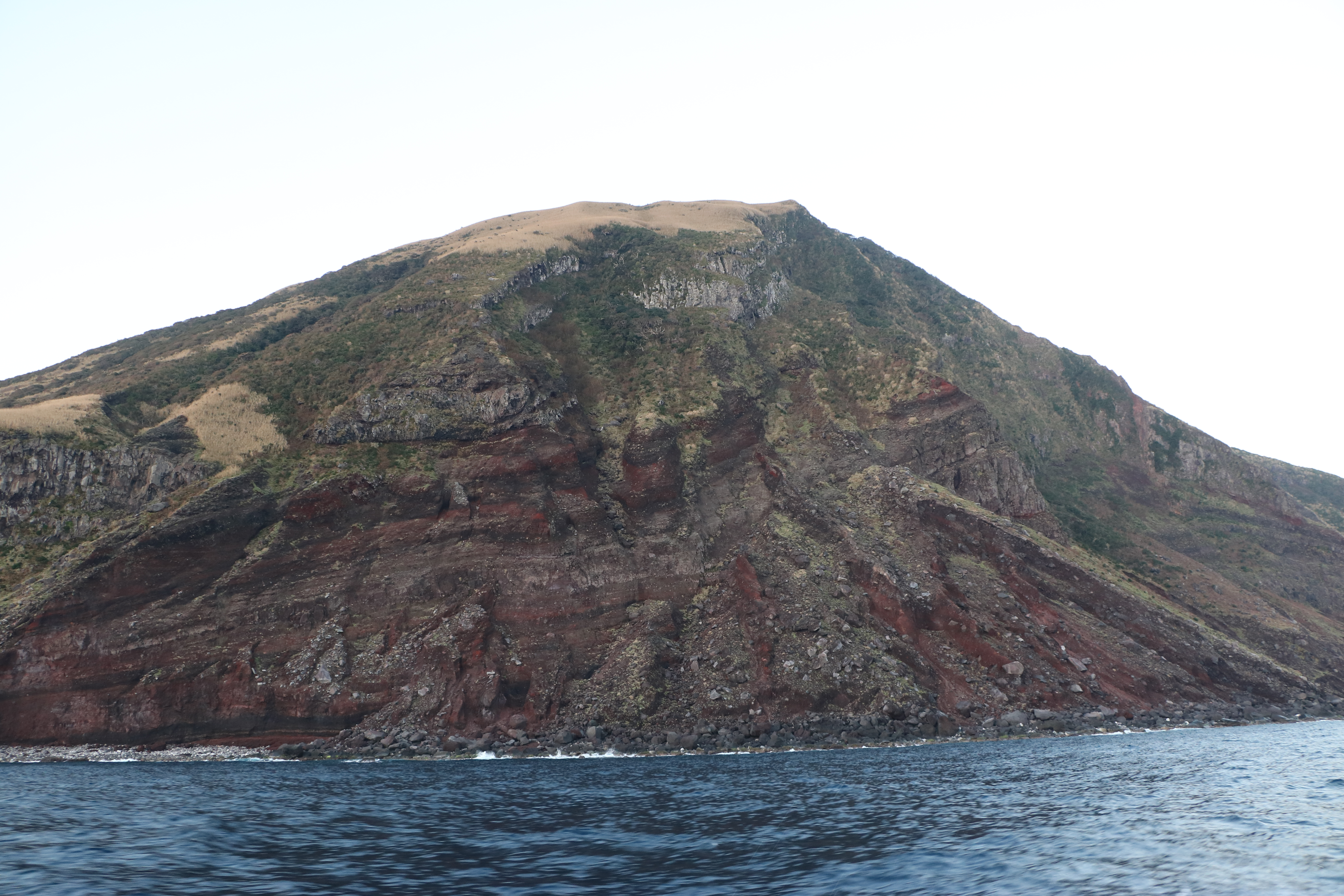 八丈小島の北東側の断崖。